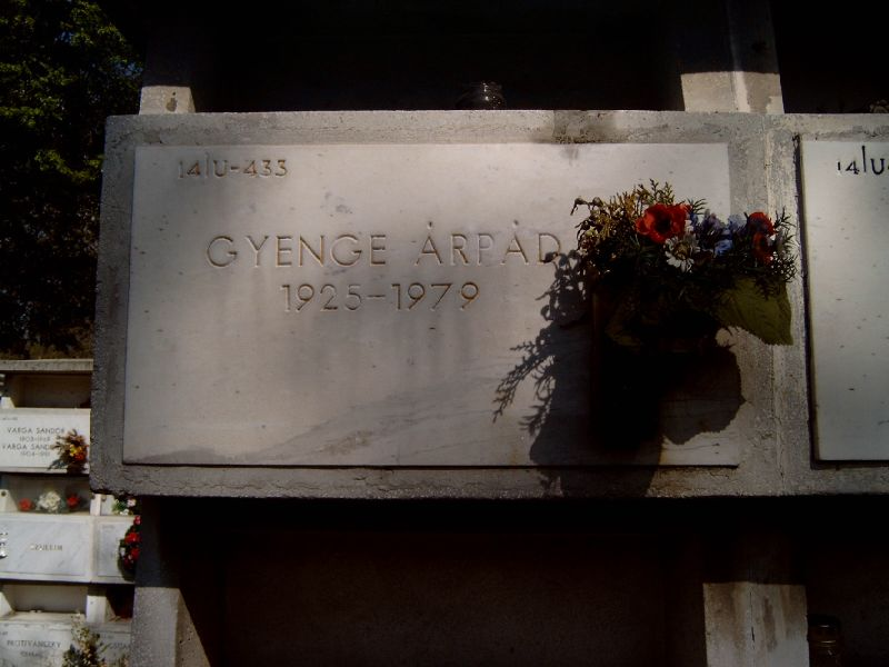 Gyenge Árpád hamvai a budapesti Új köztemetőben. 14-U-433.